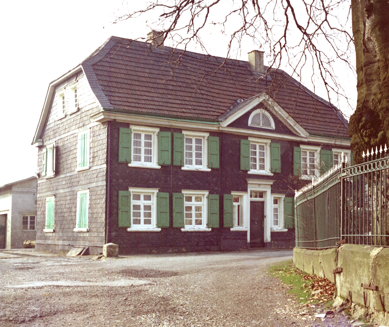 Bergisches Haus Hahnerberger Straße Nr. 12 Blick von der Straße über die Zufahrt, Teilw. Gesamtansicht, wurde zum Spessartweg im Wuppertal Küllenhahn transloziert. Agfa Color 80S, Rollei SL 66